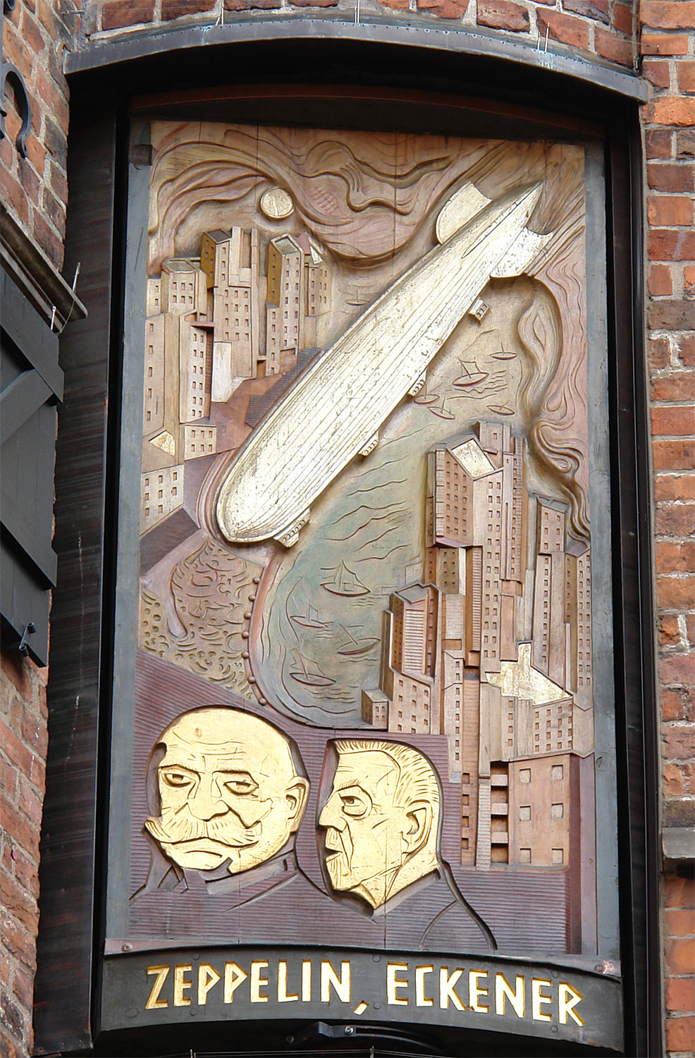 Bernhard Hoetger: Ferdinand Graf Zeppelin, Hugo Eckener (1934, Ozean-Bezwinger auf 10 Bildtafeln). Standort: Haus des Glockenspiels in der Böttcherstraße, Bremen